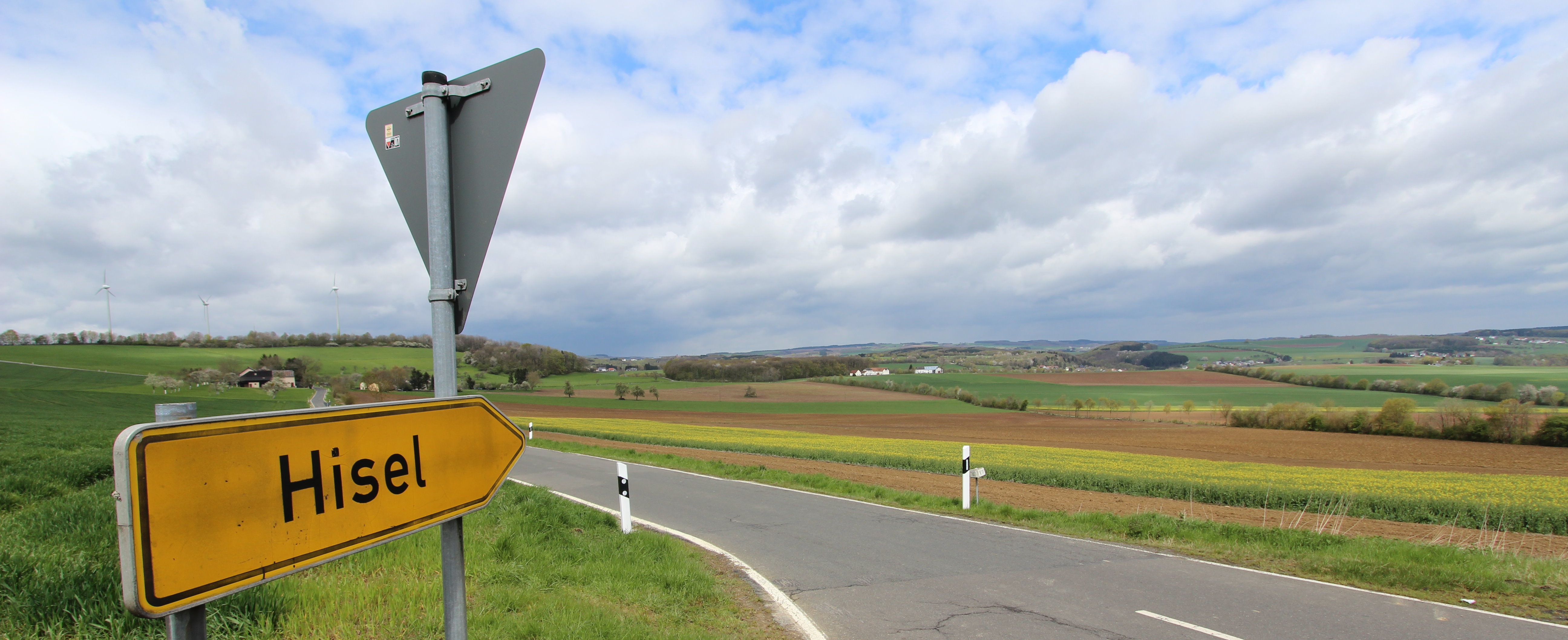 Aufnahmeort: B50 Abfahrt Hisel K11. Aufnahme von 2016.